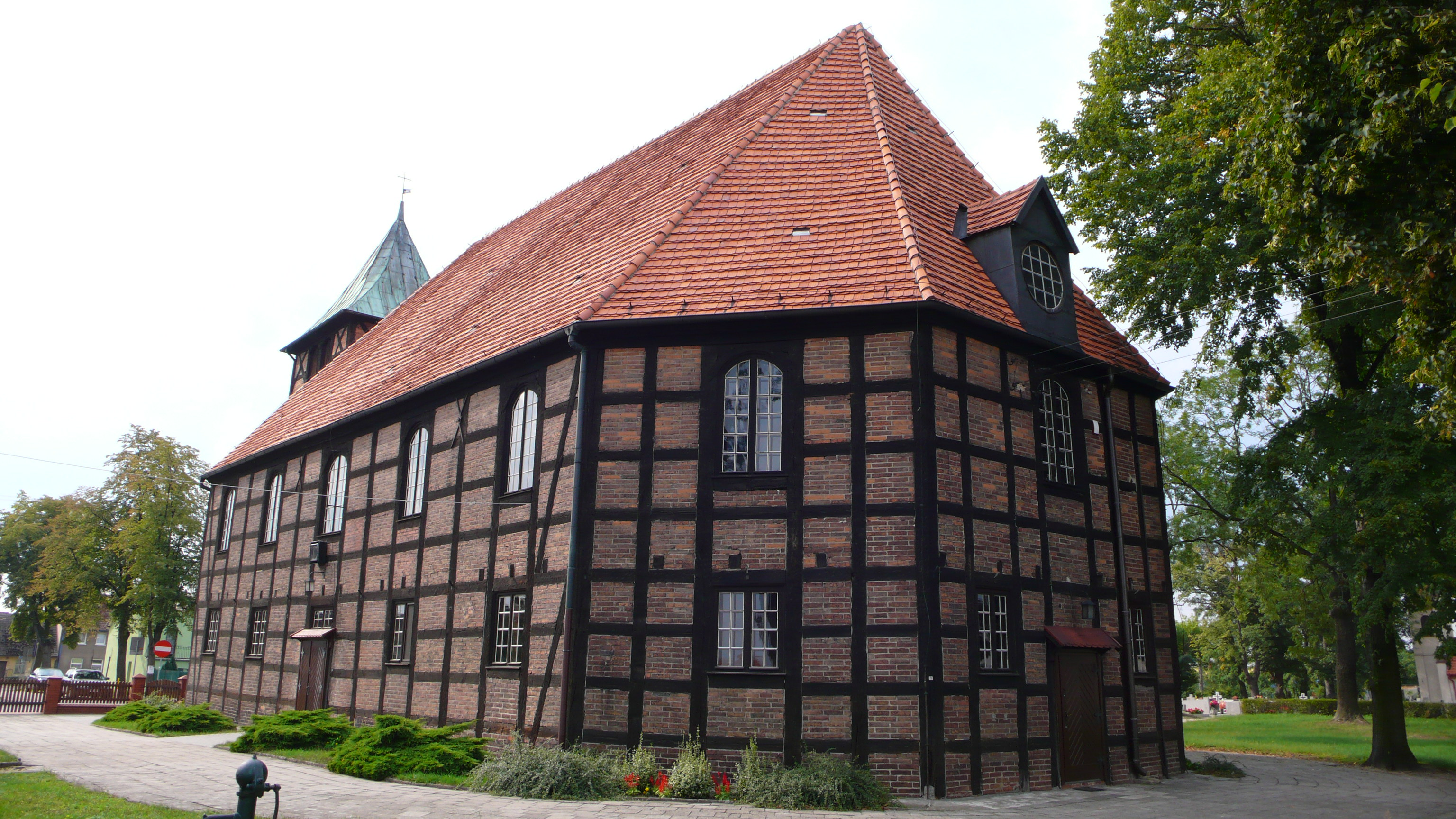 Kościół w Zaborowie fot. 3